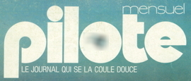 Logotype de Pilote, de la couverture du #3, août 1974. Le centre de l'O est mis flou à cause de droit d'auteur.